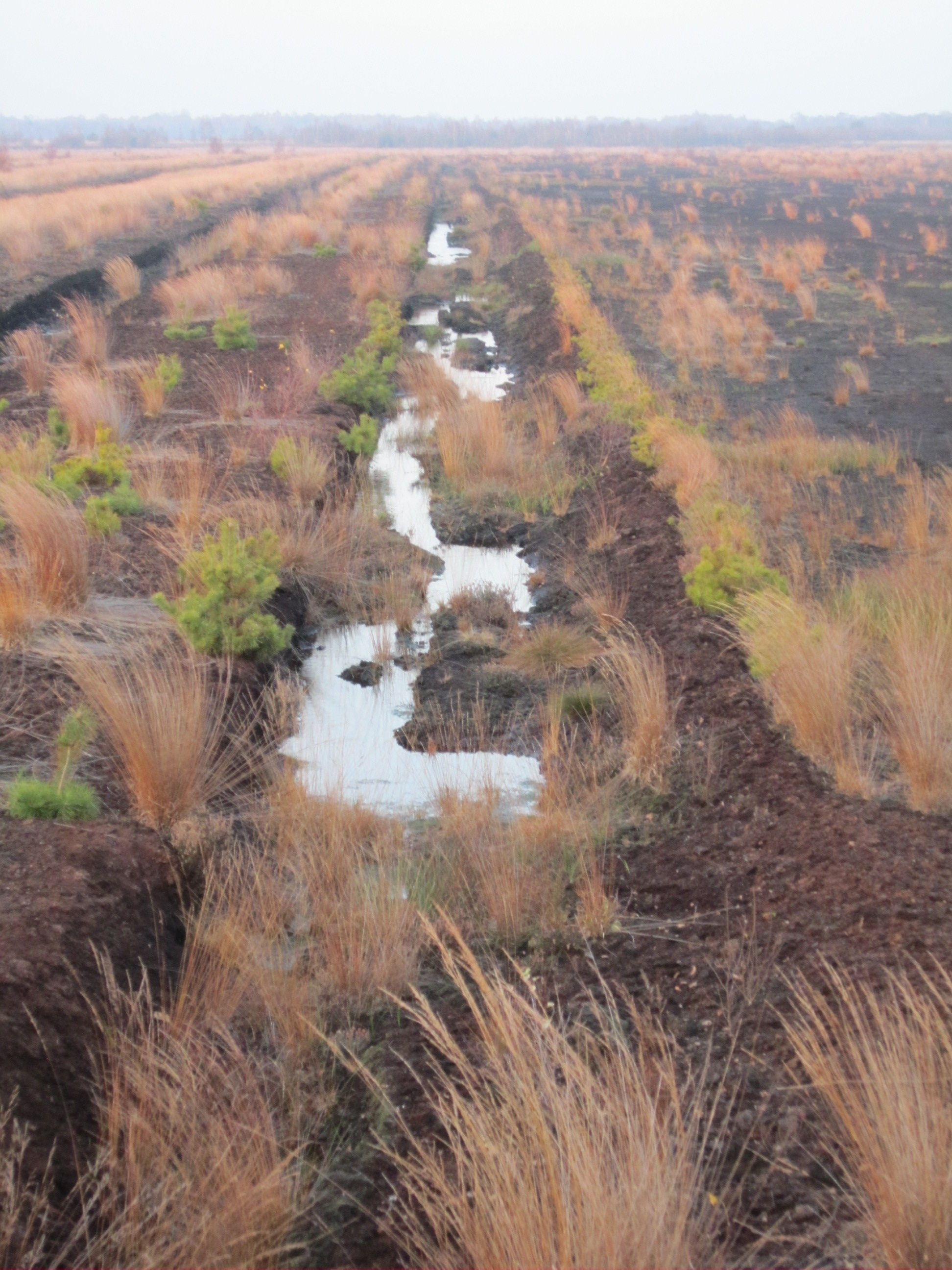 Aschener Moor im Landkreis Diepholz (Niedersachsen)